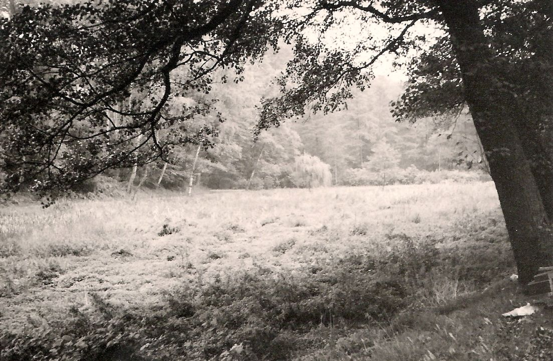 Deutschmühlenweiher in Saarbrücken im September 1957